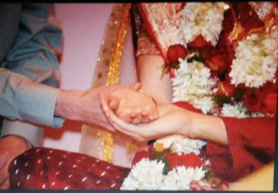 शादी की एक रस्म